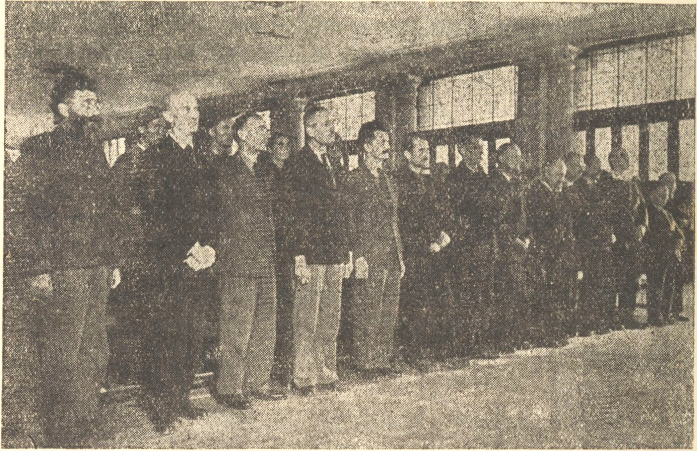 Srpskohrvatski / српскохрватски: Čitanje presude optuženima na beogradskom procesu. Za vreme čitanja presude stoje (s leva na desno): Dragoljub-Draža Mihailović, Stevan Moljević, Đura Vilović, Radoslav-Rade Radić, Slavoljub Vranješević, Miloš Glišiš, Dragomir-Dragi Jovanović, Tanasnje-Tasa Velibor Jonić, Đura Dokić, Kosta Mušicki, Boško Pavlović, Lazar-Laza Marković i Kosta Kumanudi.